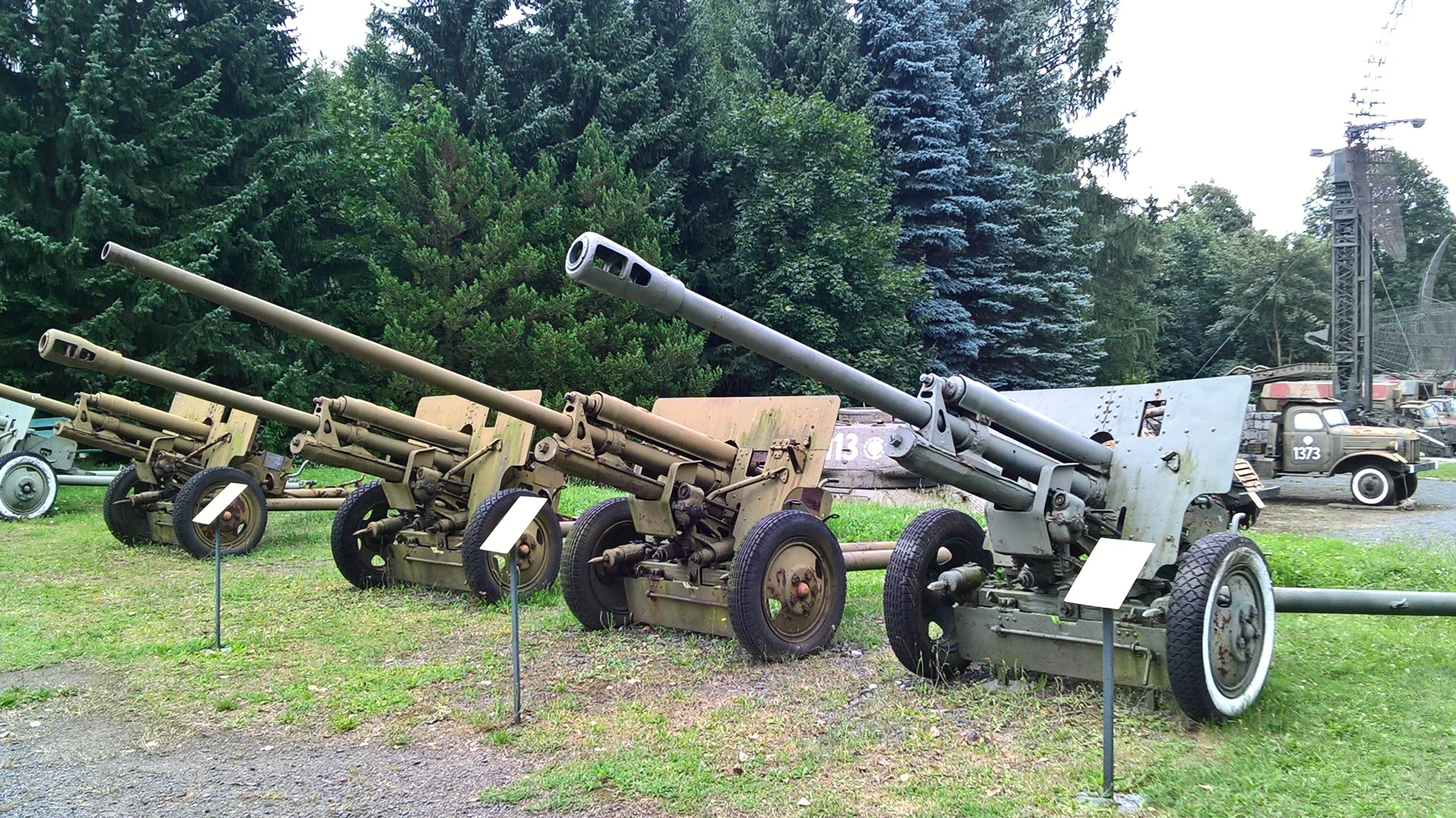 Armaty ZiS-2 i ZiS-3 w Skansenie Uzbrojenia Wojska Polskiego w Jeleniej Górze